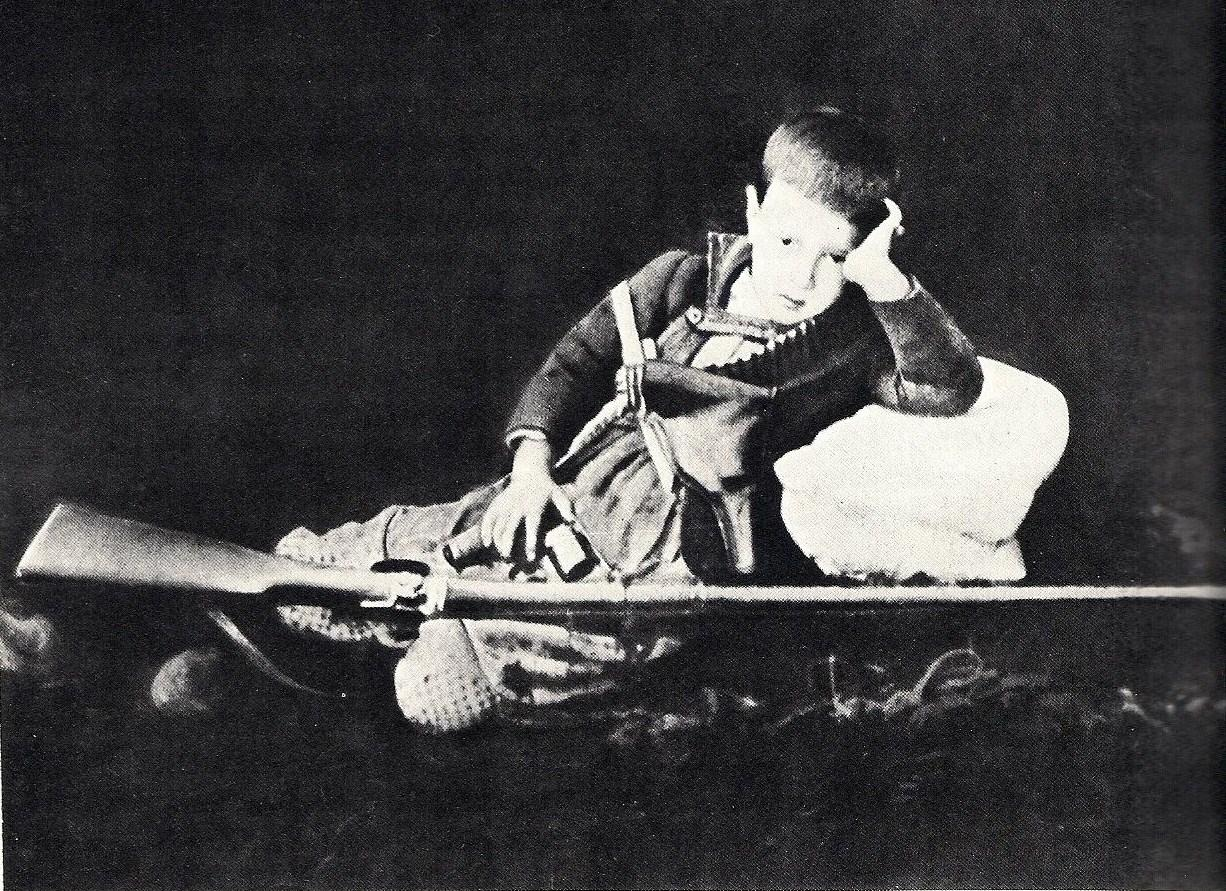 Константинос Карамалис като андартче.